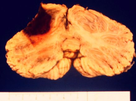 Infart hemorragic cerebelos